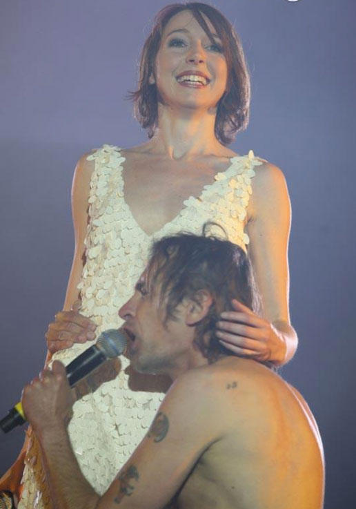 Jeanne Cherhal & Didier Wampas